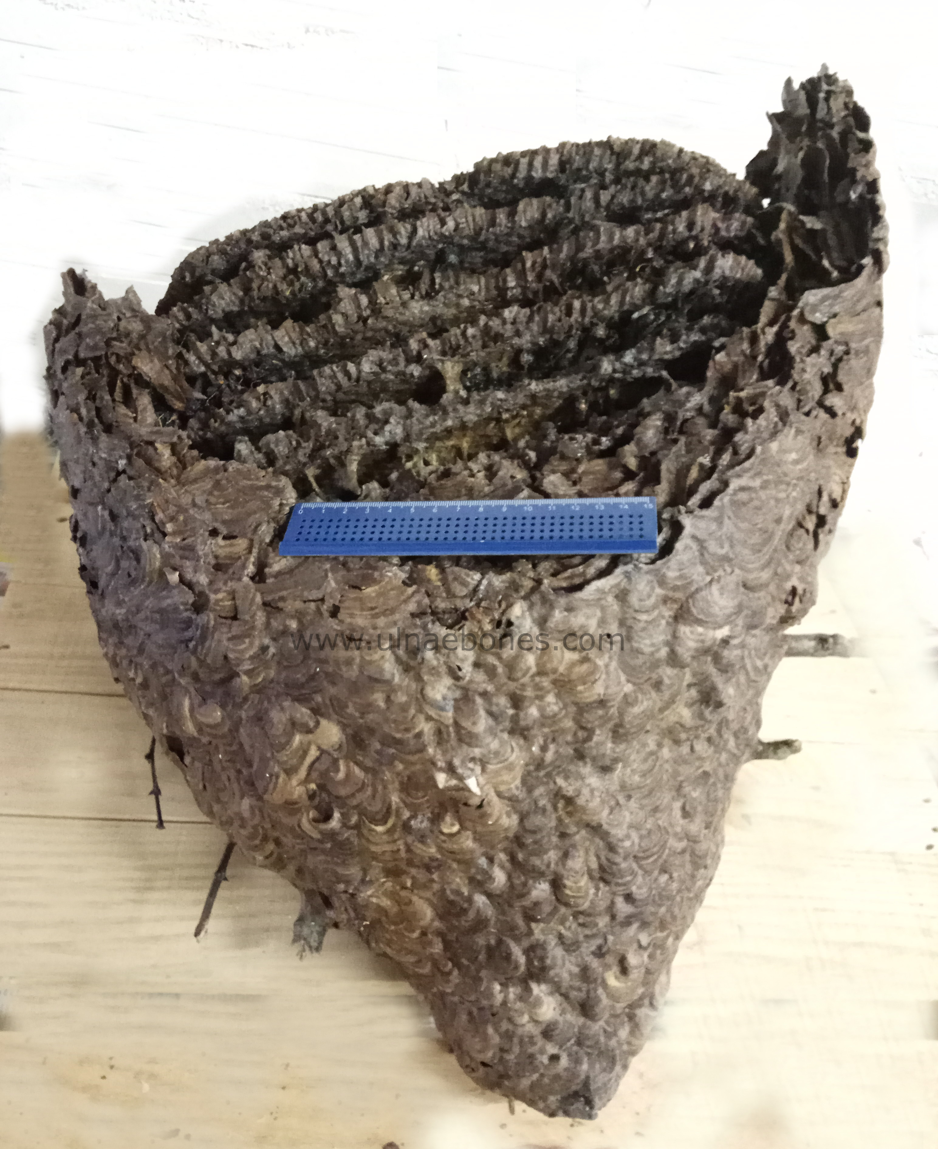 Detalle del nido de avipa asiática